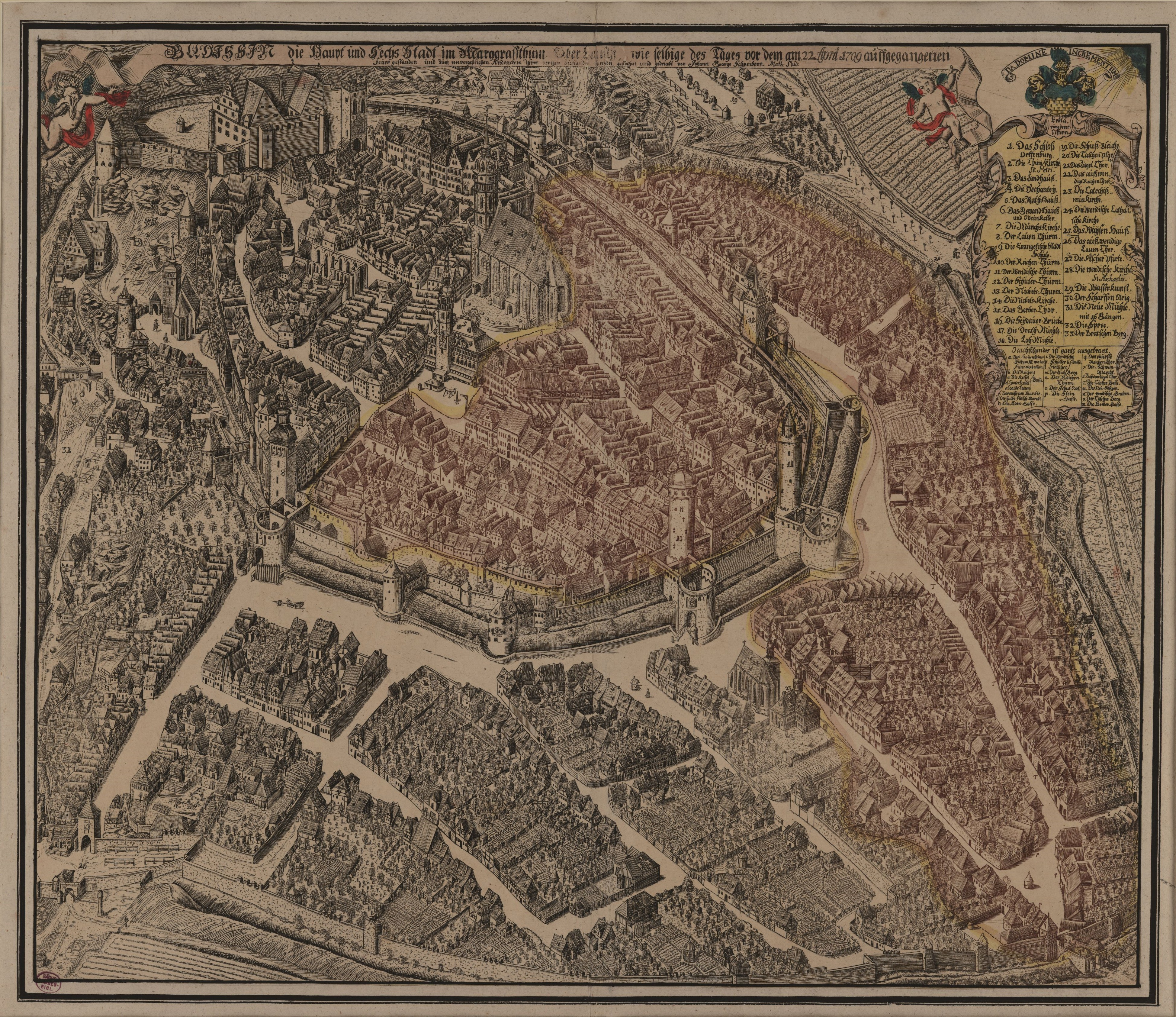 Ansicht von Bautzen, Kupferstich, um 1710, Budissin die Haupt und SechsStadt im Marggraffthum OberLausitz, wie selbige des Tages vor dem am 22. April 1709 auffgegangenen Feuer gestanden und Zum unvergeßlichen Andencken ihres vorigen Zustandes abgerissen : [Vogelschaubild] / gestochen und gedruckt von Johann George Schreibern Math. Stud. - [S.l.], [ca. 1710]. - 1 Kt., 54 x 45 cm, 1710